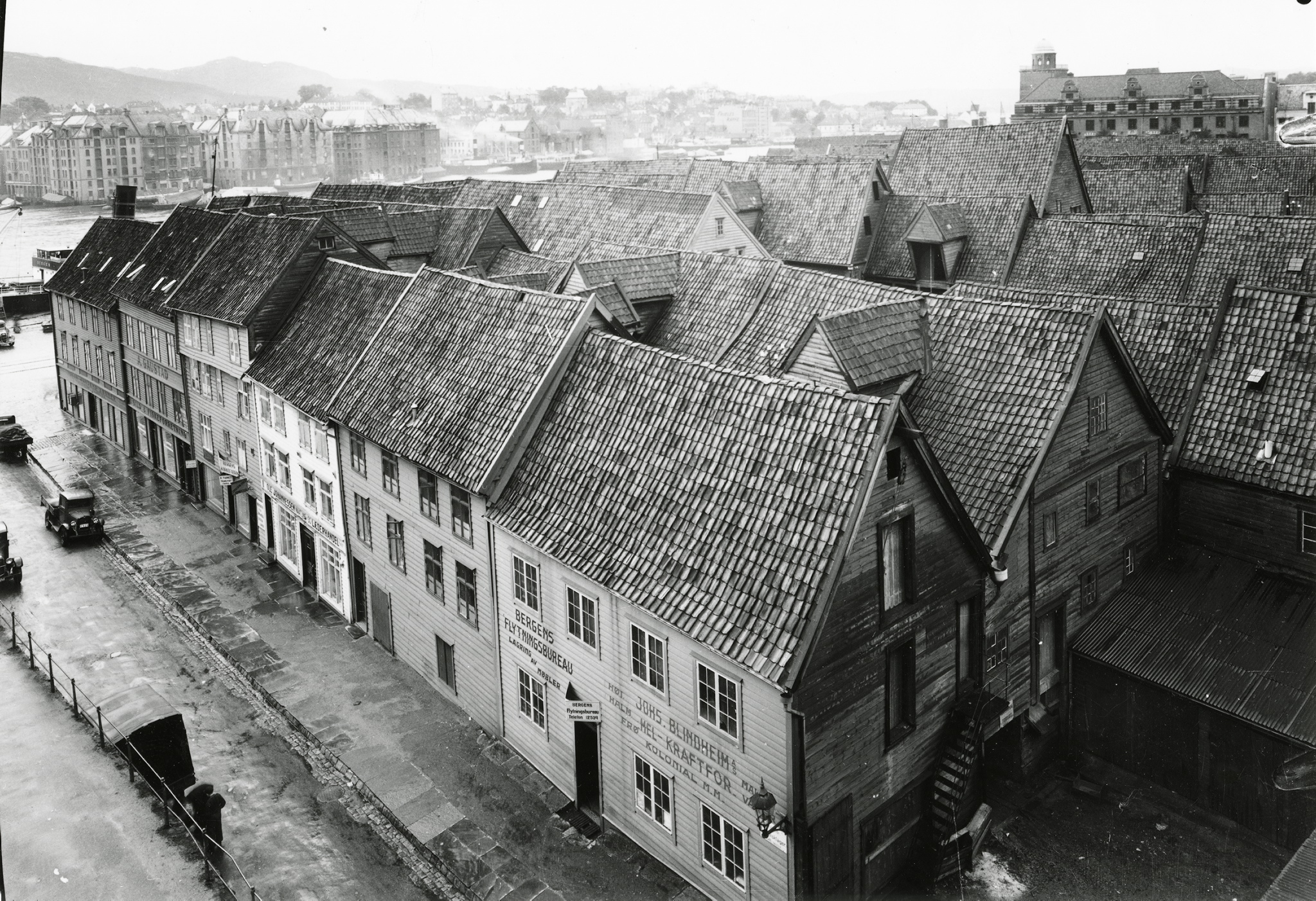 Holmedalsgården